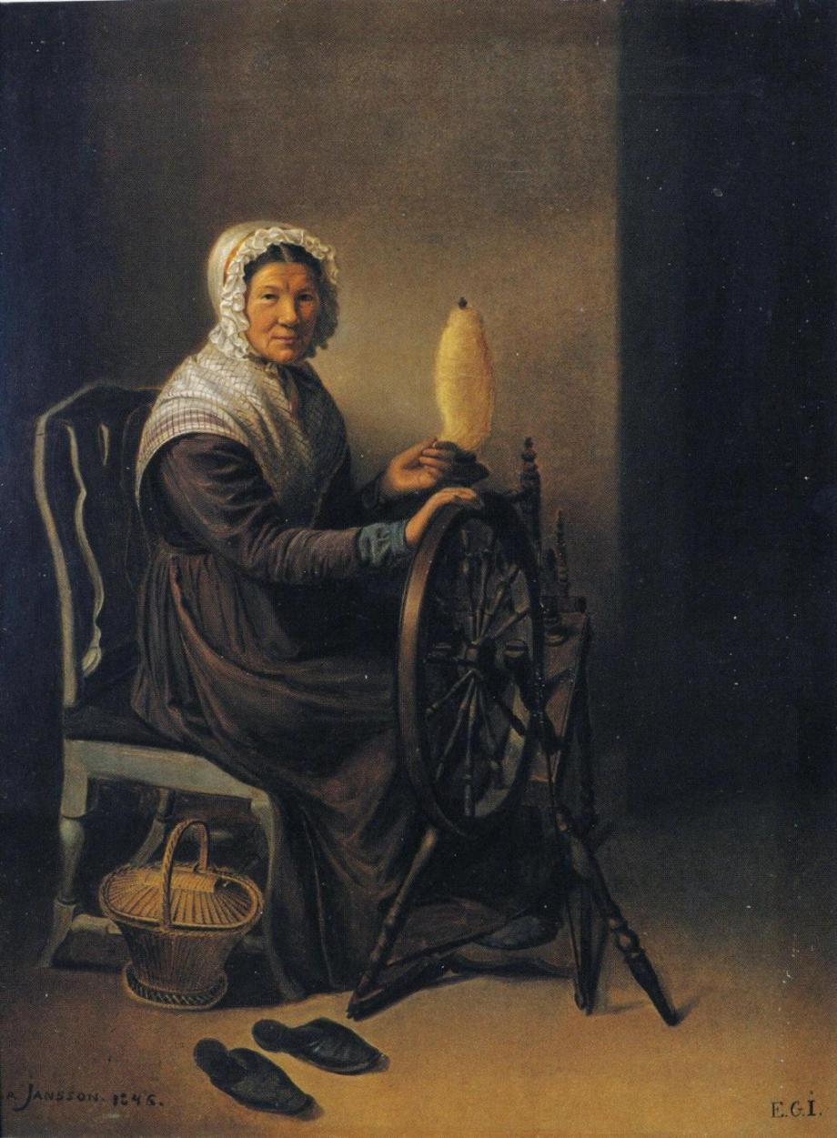 Edla Jansson-Blommérin maalaus.